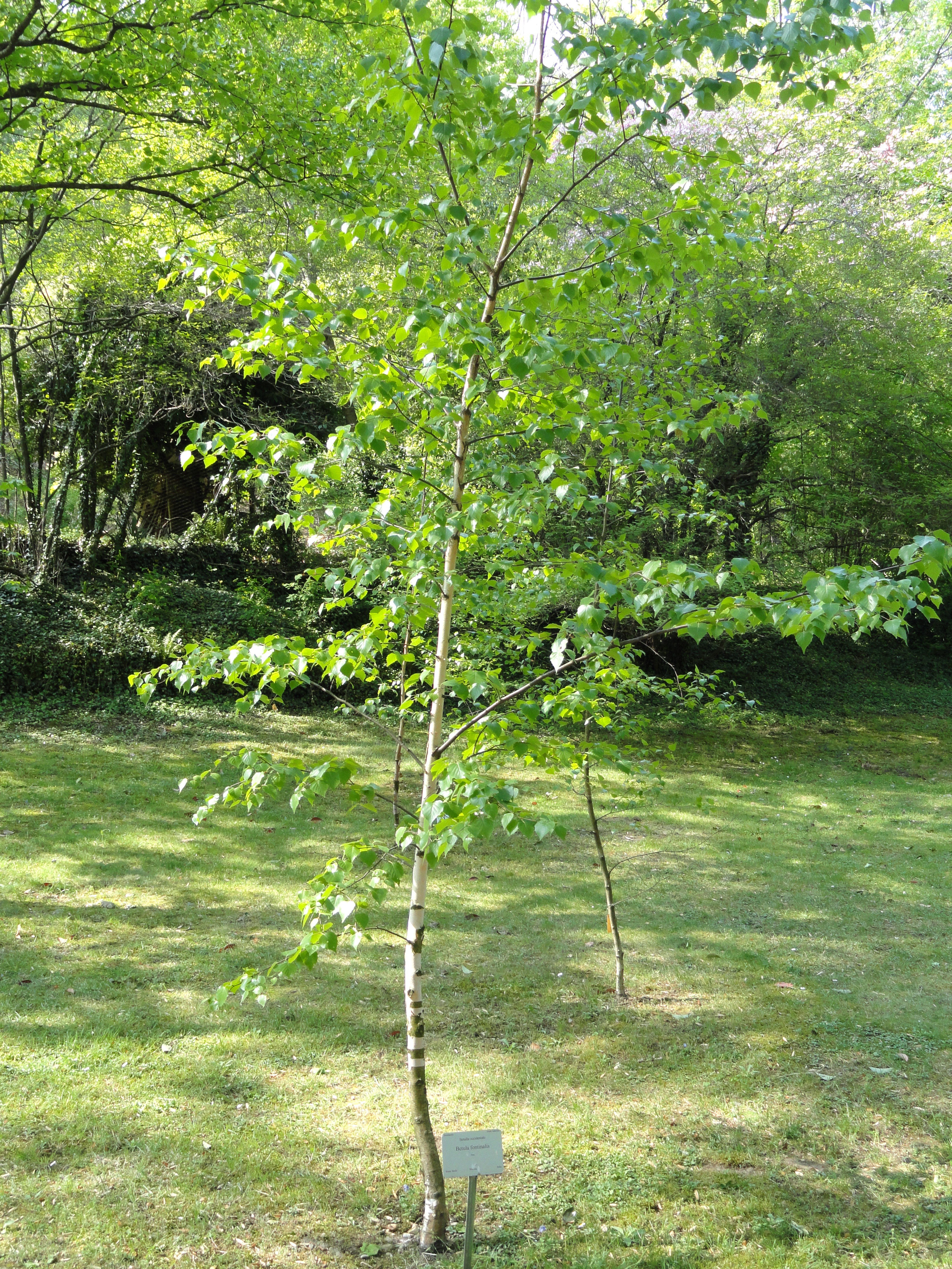 Betula occidentalis specimen in the Villa Carlotta (Tremezzo), on Lake Como, Italy.